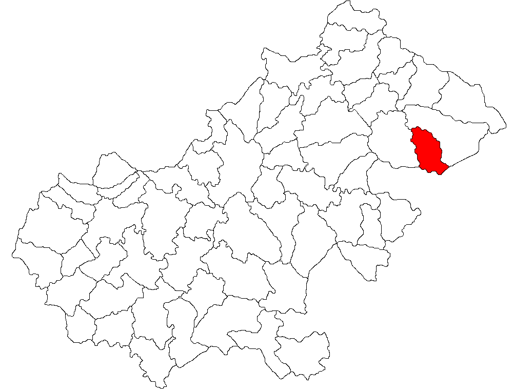 Categorie:Hărţi ale judeţului Satu Mare